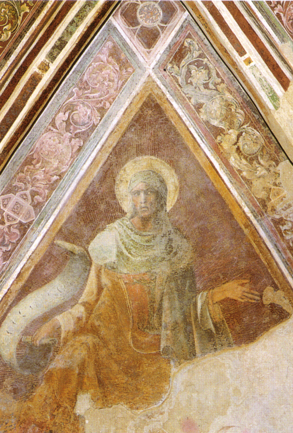 Lorenzo monaco, michea